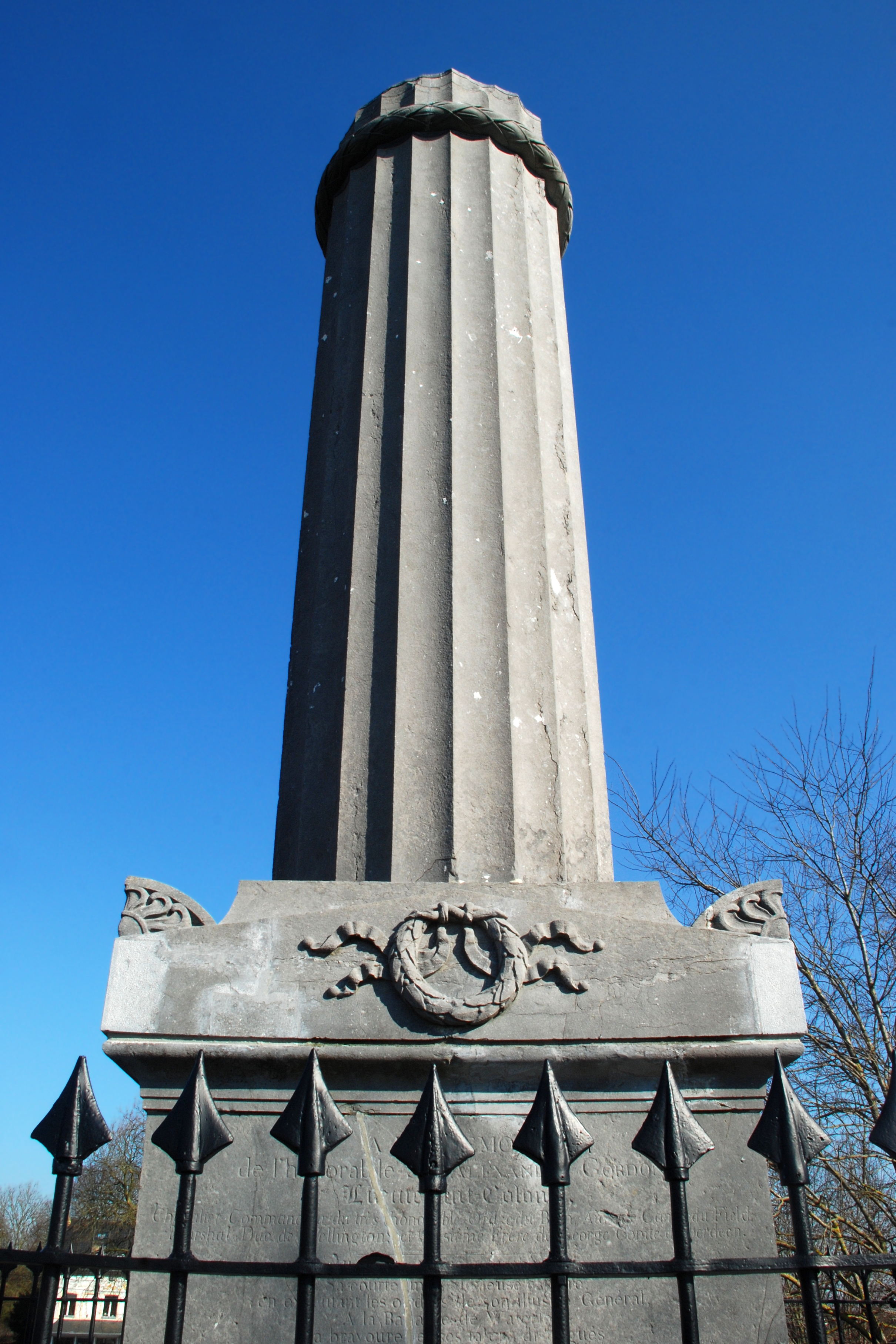 Belgique - Brabant wallon - Bataille de Waterloo - Monument Gordon